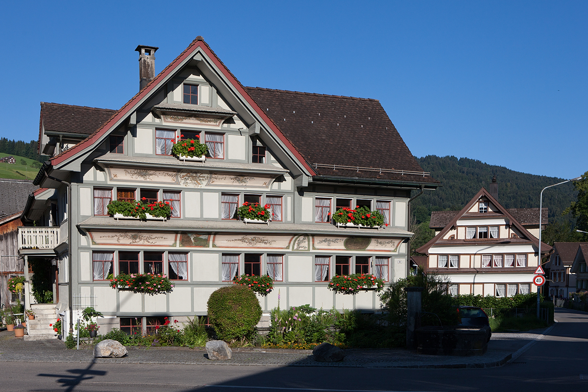 Dorfteil Thurau in Ebnat-Kappel